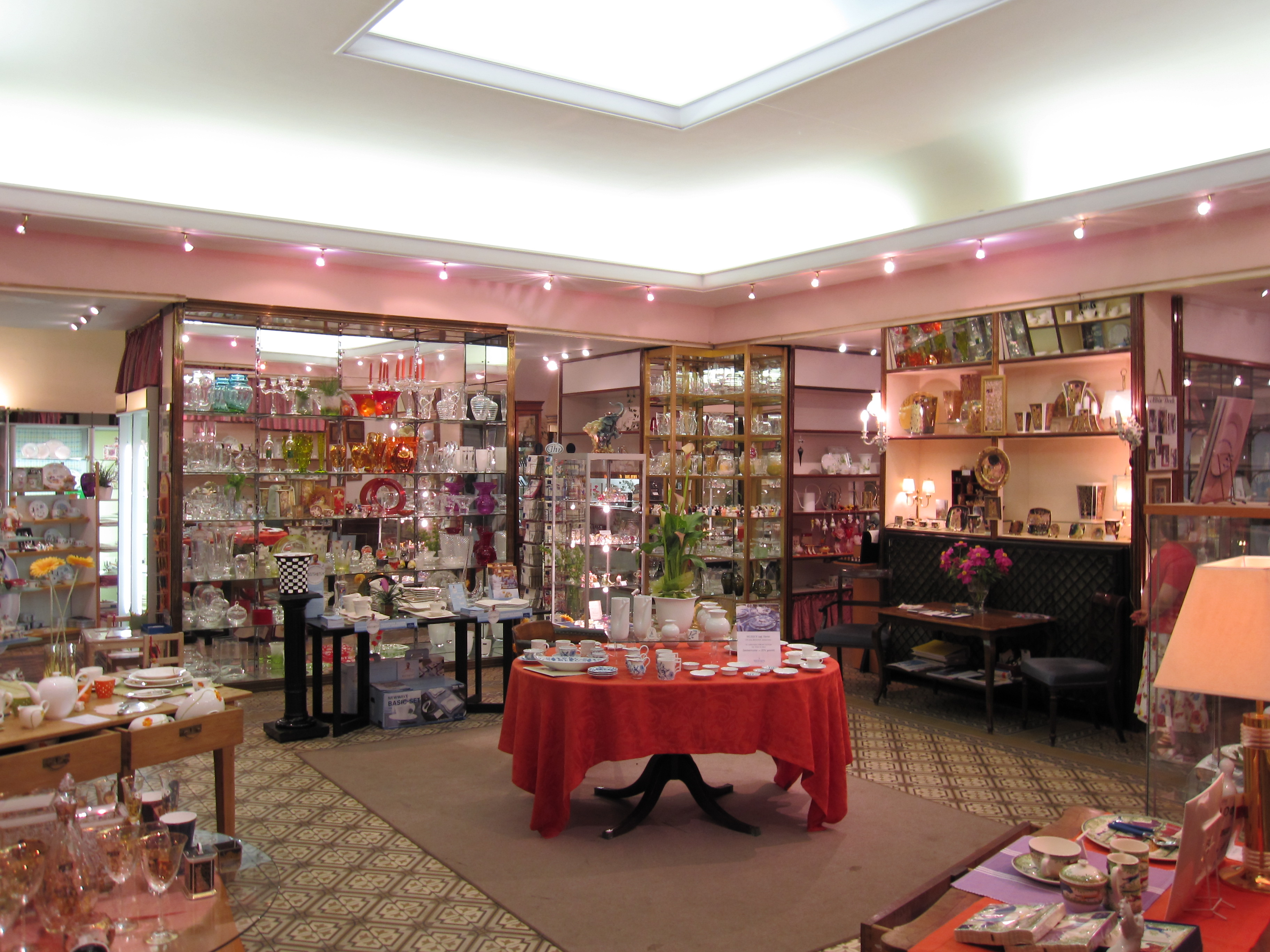 Interior of Albin Denk in Vienna.